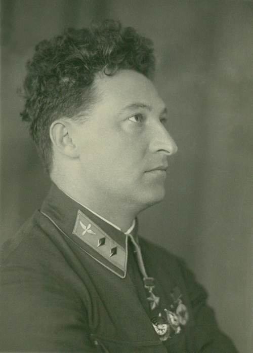 Фотографія Героя Радянського Союзу — Єрьоменко Івана Трохимовича у звані комдива